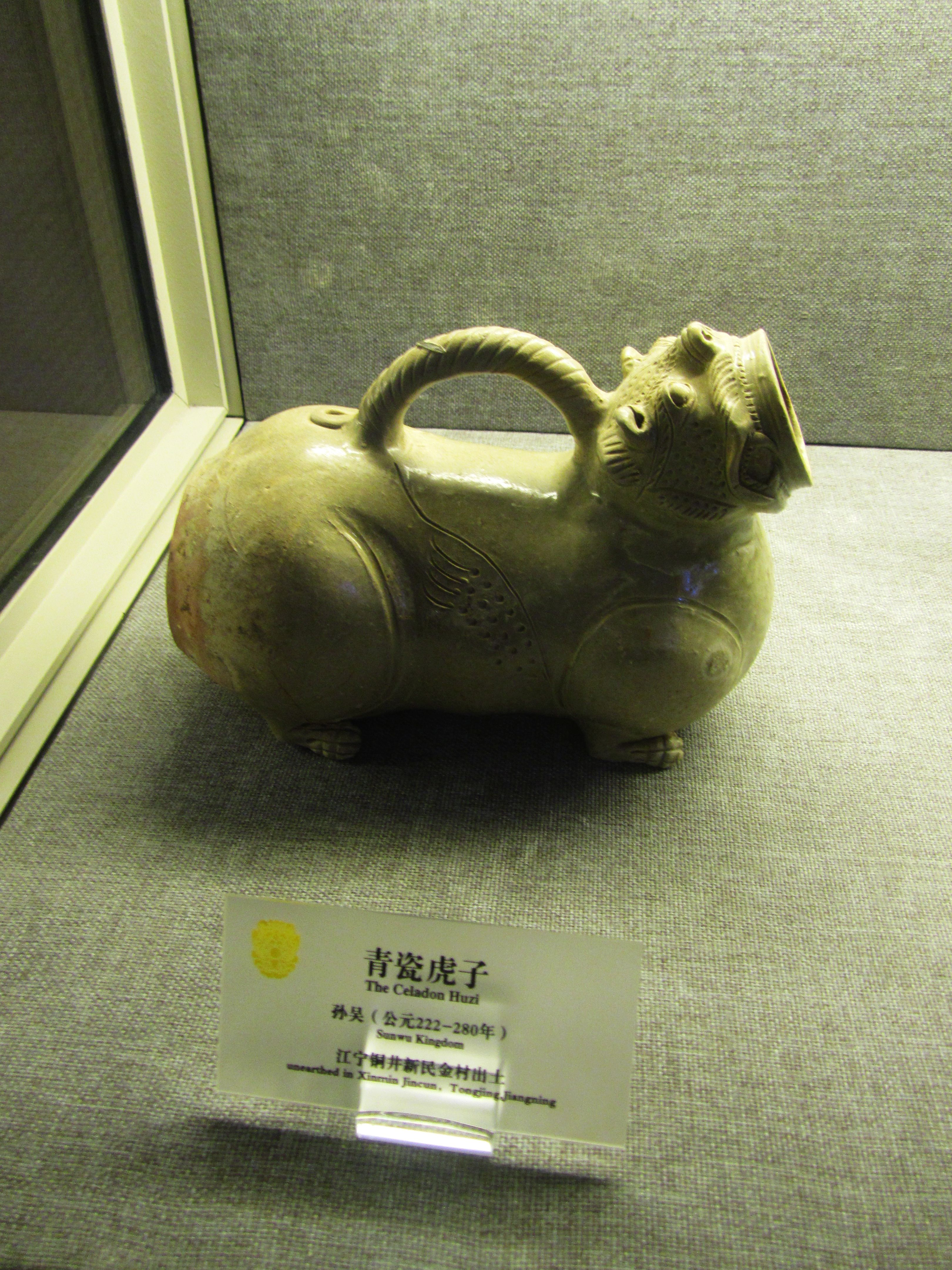 青瓷虎子，孙吴，铜井新民金村出土。